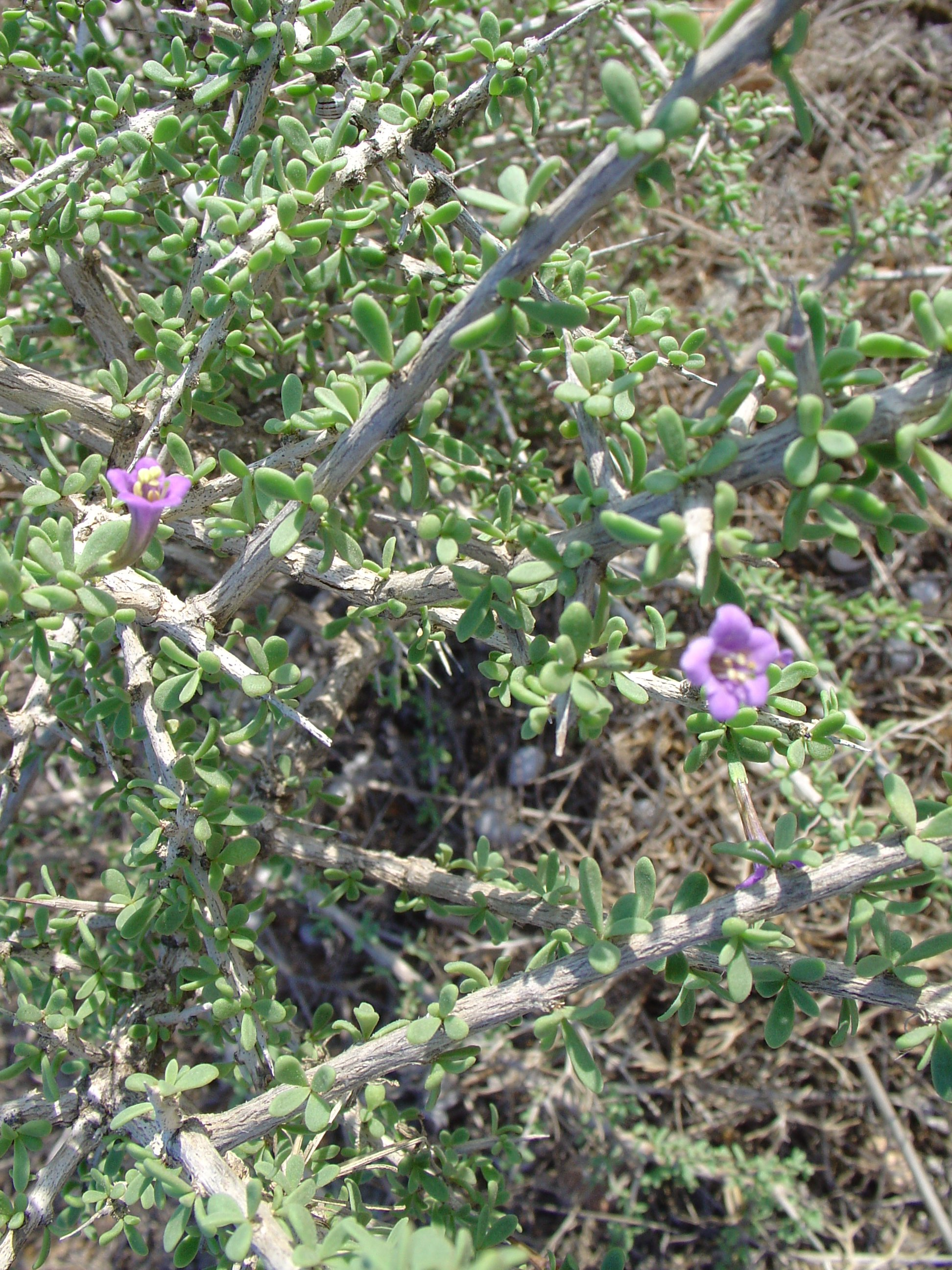 Lycium intricatum, un iberoafricanismo fotografiado en Cabo Palos, Murcia, Spain